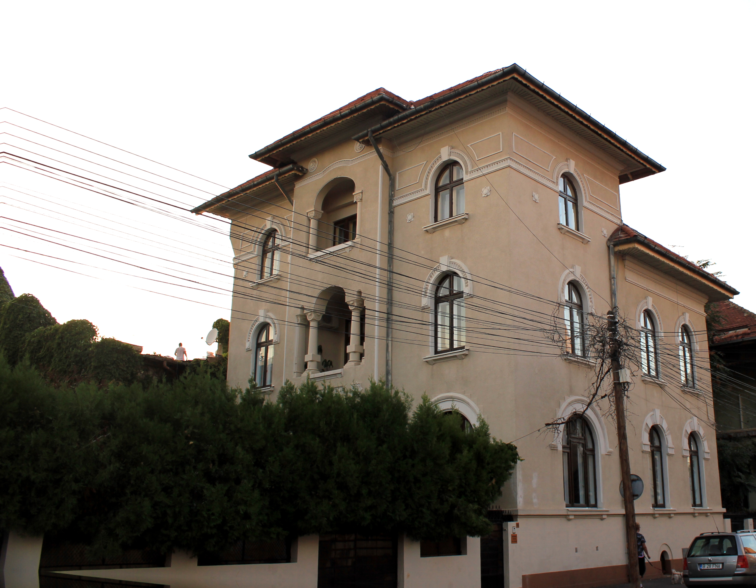 Casa Burghelea 16